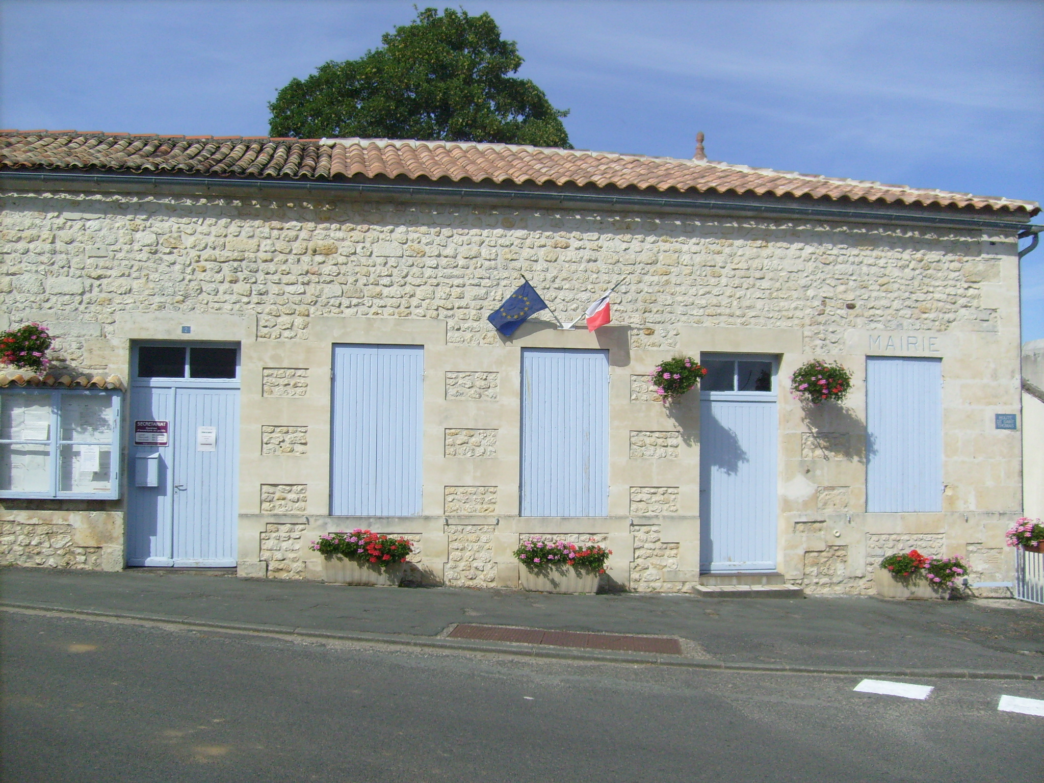 Mairie de Saint-Sorlin de Cônac